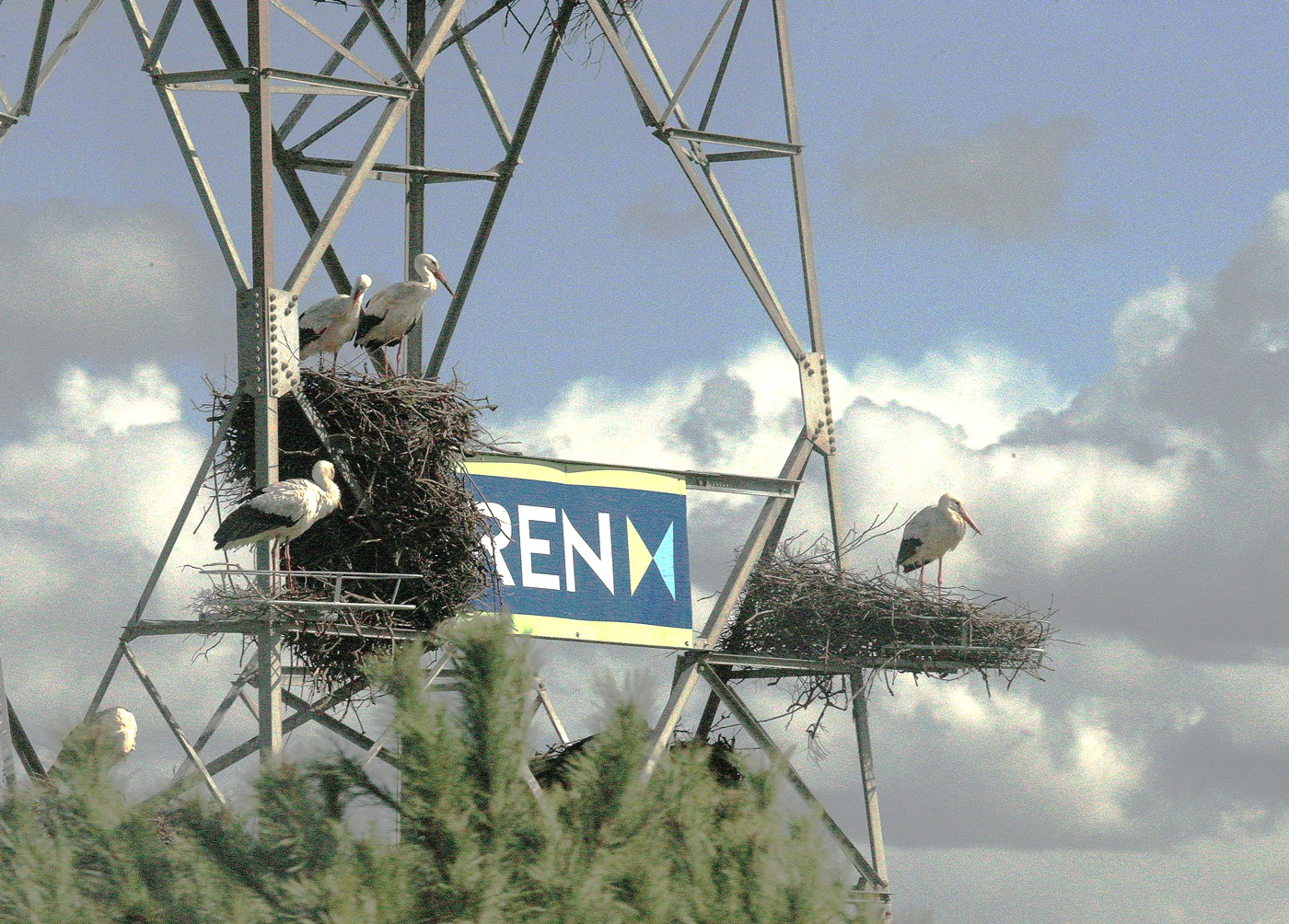 Nester mit Weißstörchen auf Freileitungsmast im Alentejo, Portugal